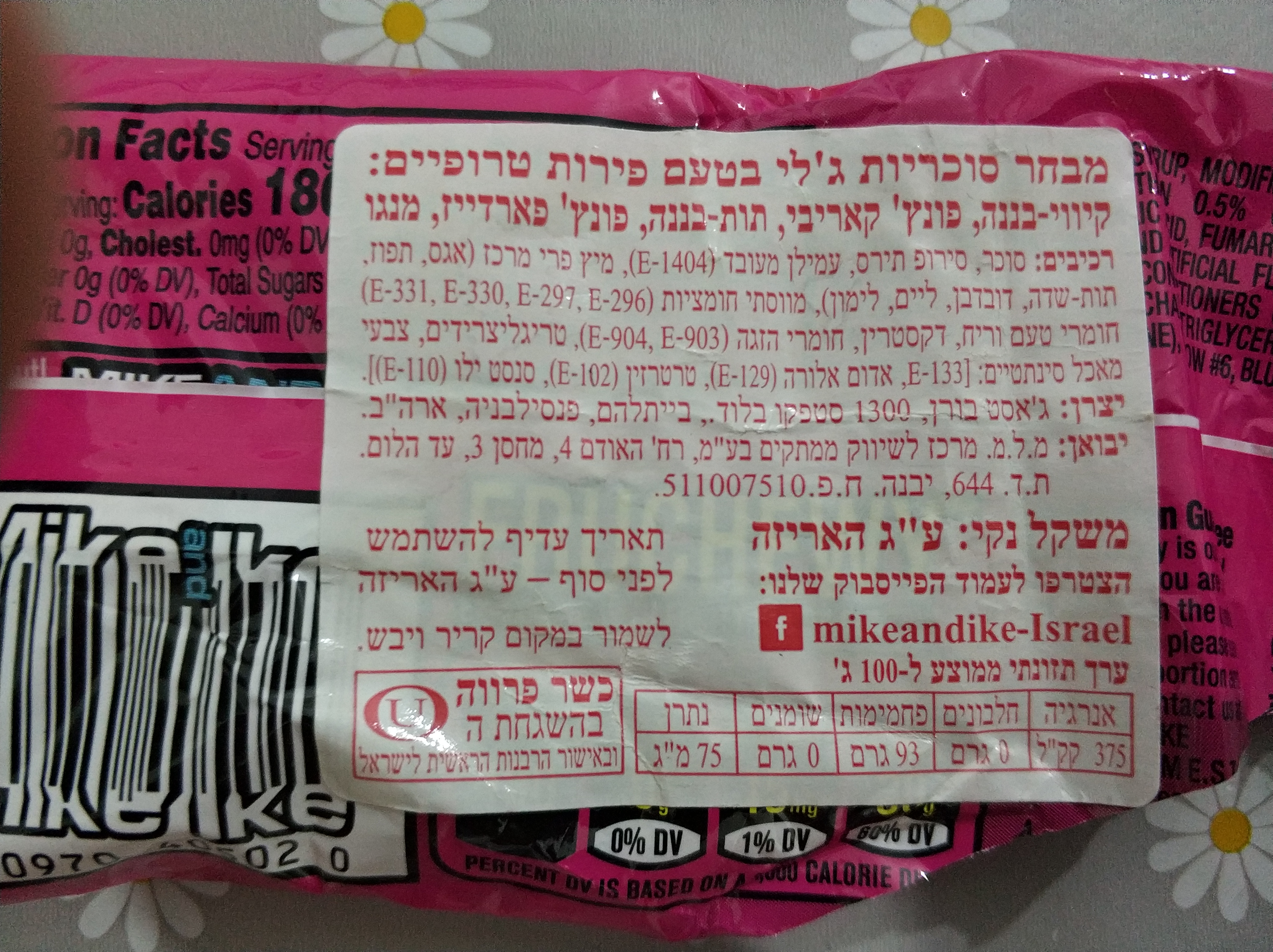 רשימת רכיבים של סוכריות ג'לי ניתן לראות 11 רכיבי E ברשימה